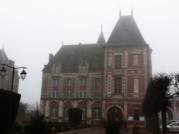 Hôtel de Ville de Crèvecœur-le-Grand|Crèvecœur le Grand (Oise)